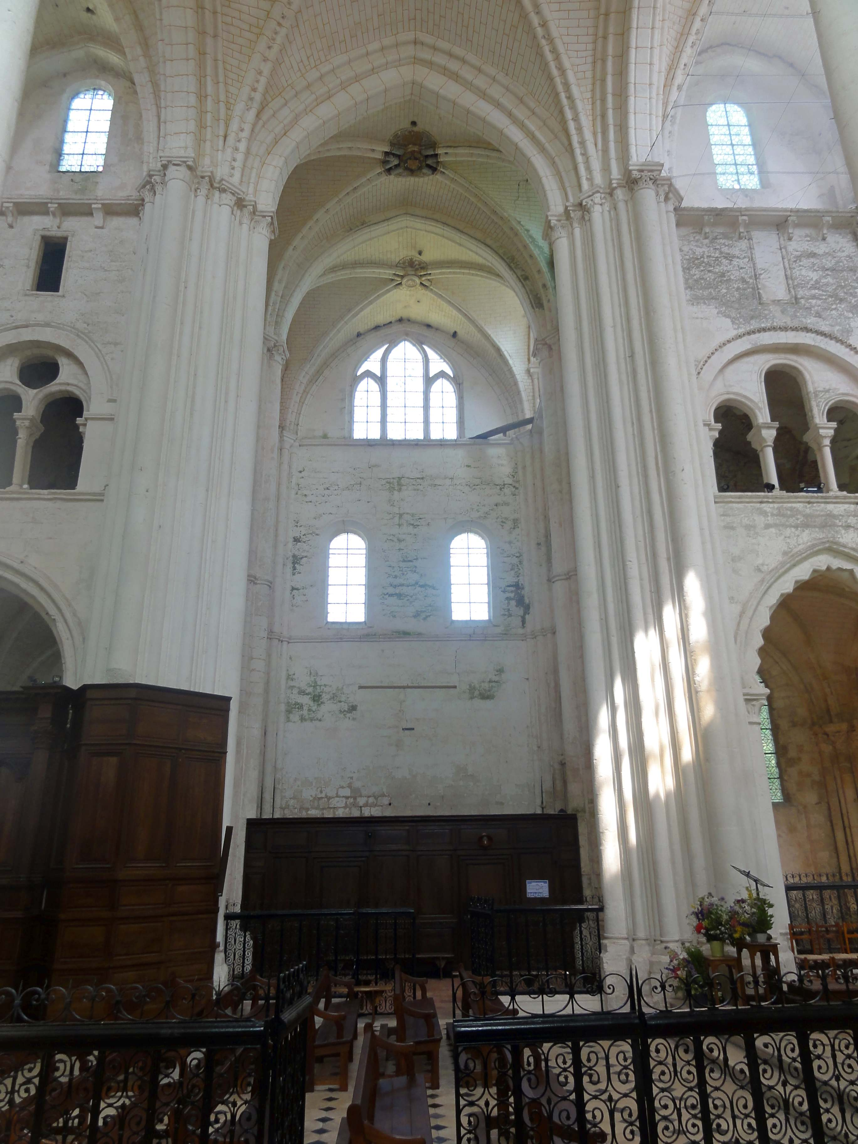 Transept de l'abbatiale - voir le titre du fichier.